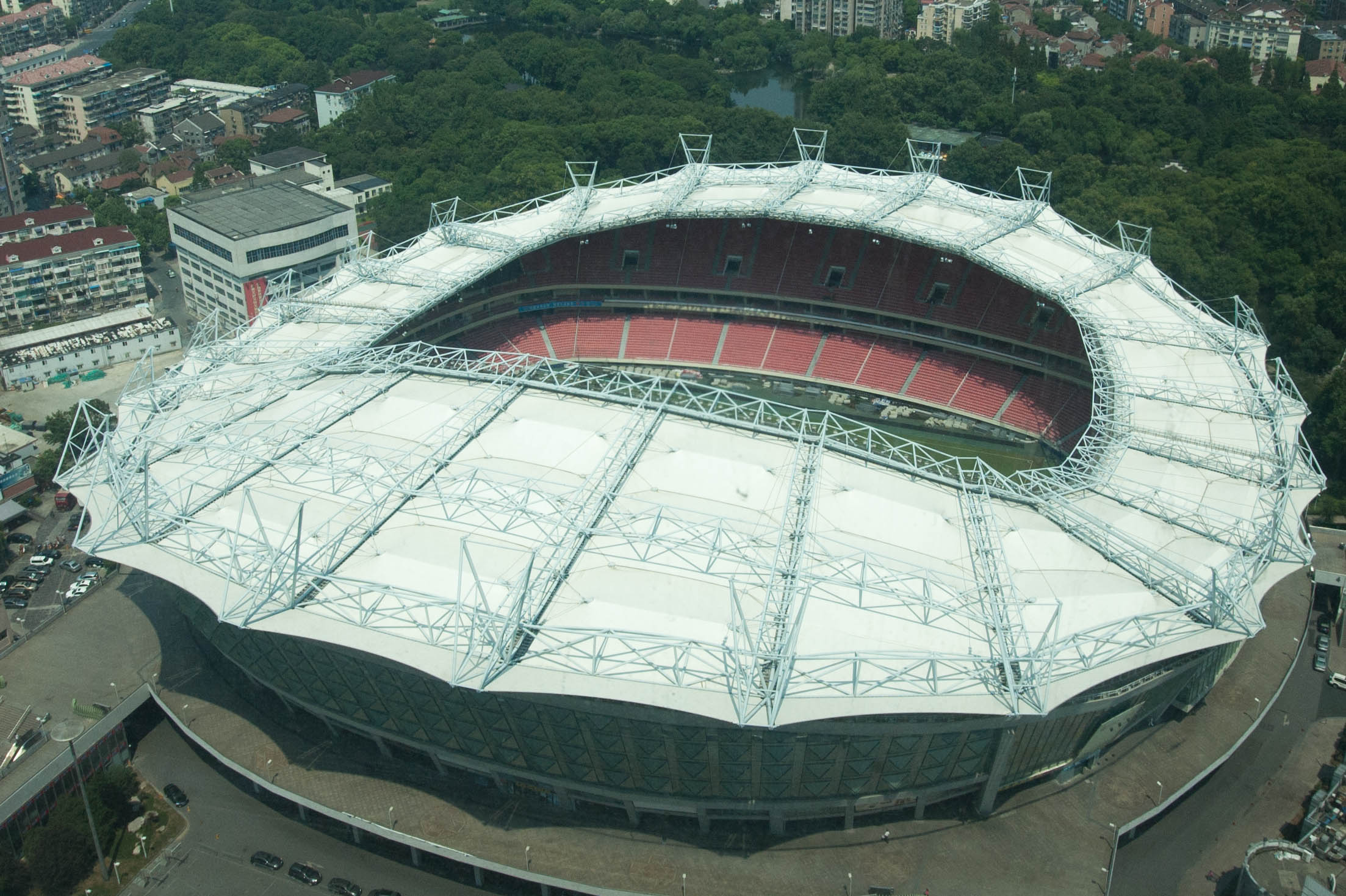 虹口足球场全貌